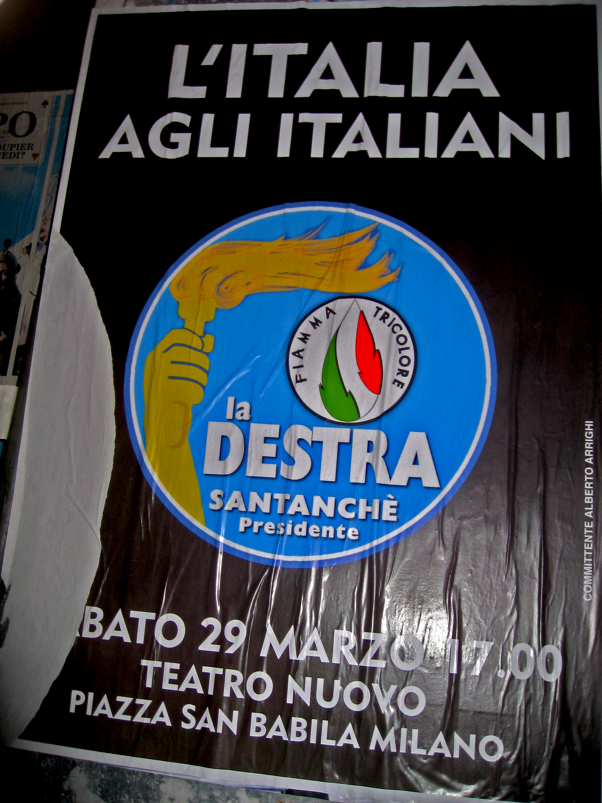 La Destra Poster